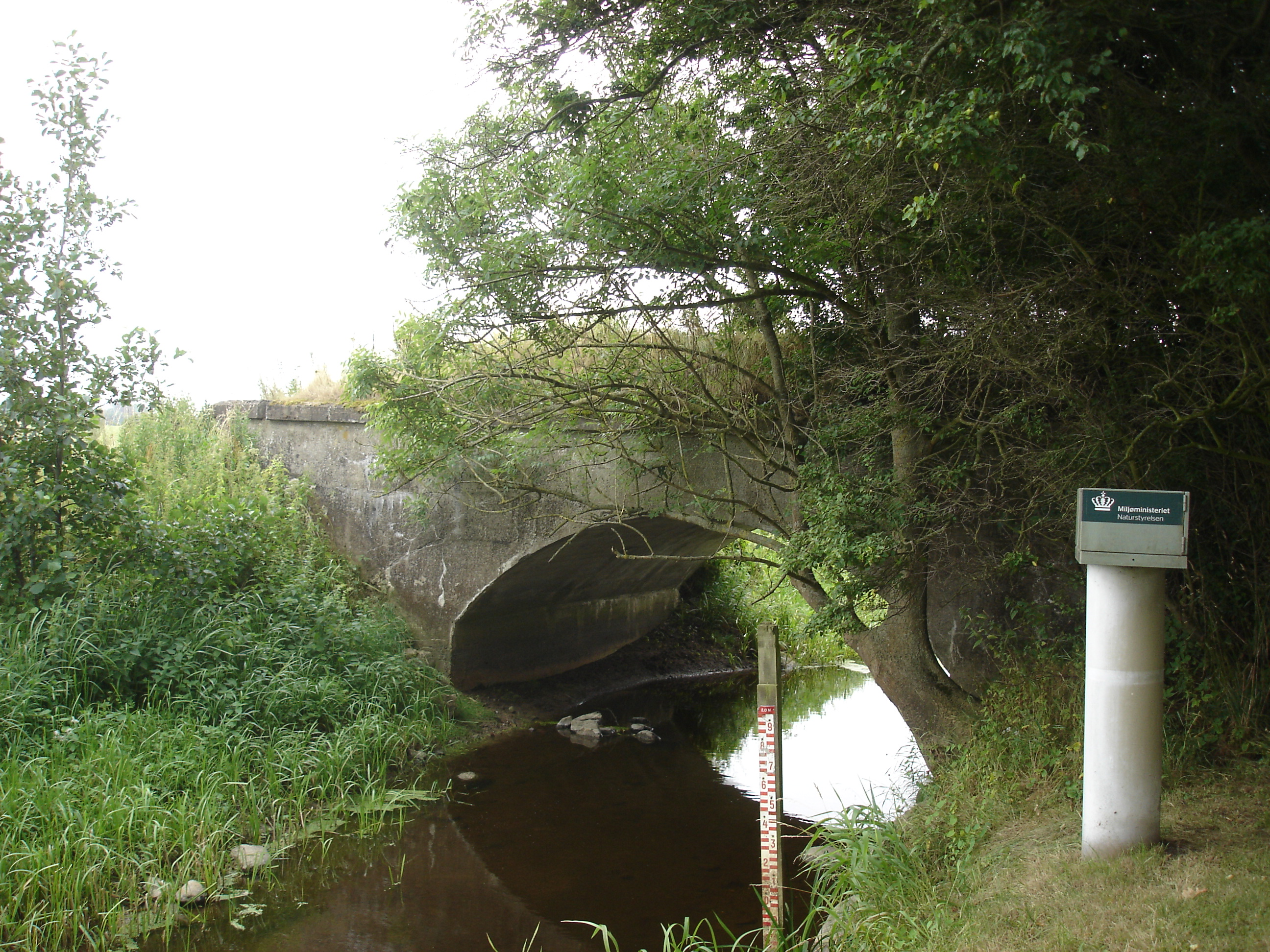 Jernbanebro over Fribrødre Å set fra haven på Rodemindesvej 2